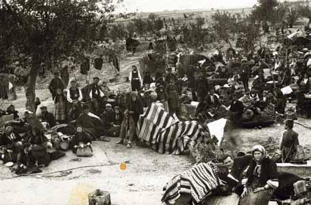 Бежанци от с. Бозец, Ениджевардарско, на лагер при Свиленград, 22 октомври 1924 г. ДА – Благоевград.